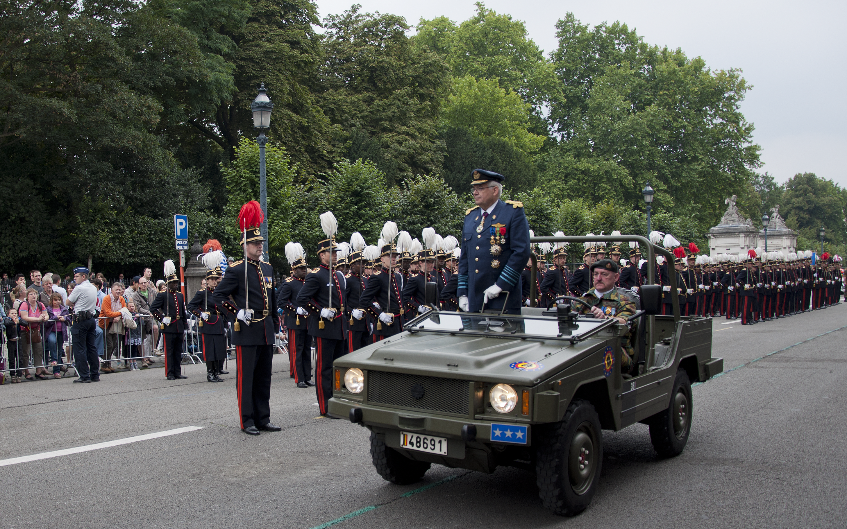 Luitenant-generaal vlieger Gerard Van Caelenberge, commandant van het defilé tijdens de Nationale feestdag te Brussel op 21 juli